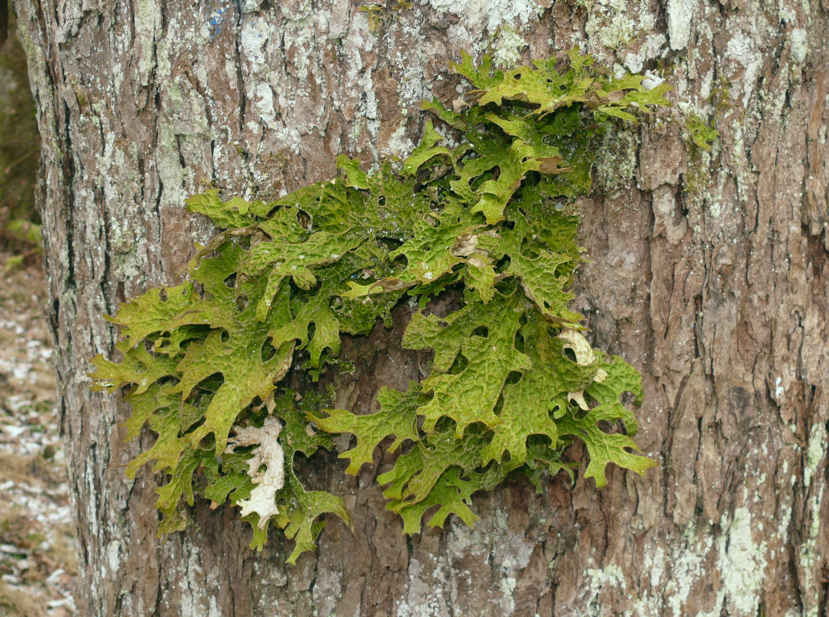 Lobaria pulmonaria, Schwäbisch-Fränkische Waldberge, Germany